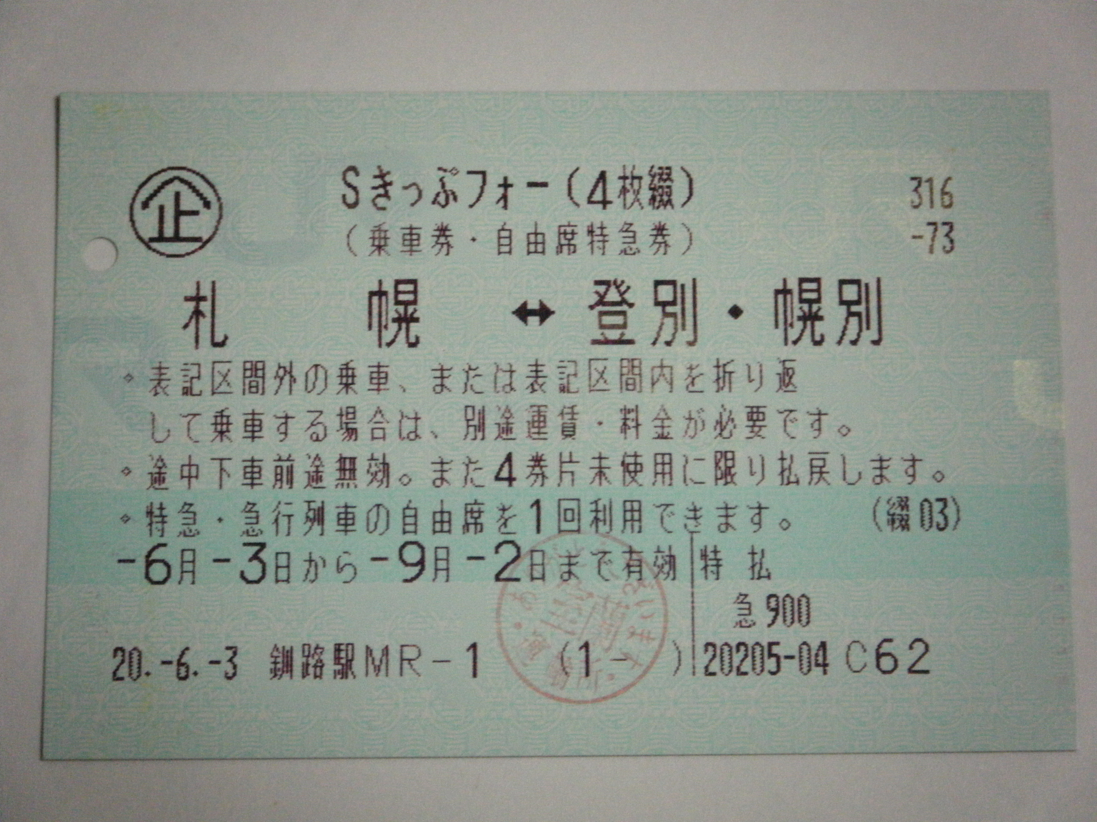 自由席往復割引きっぷ（Sきっぷ）。4枚つづりのもの。